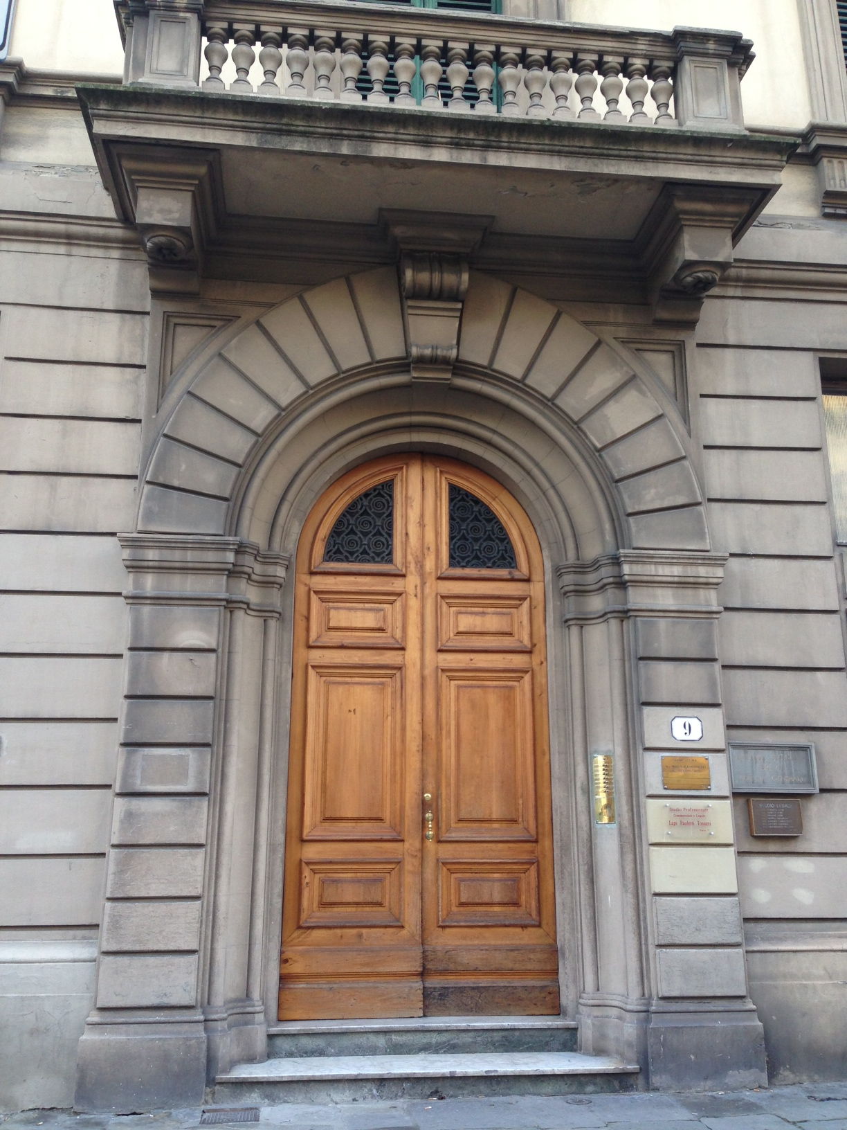 Viale Giacomo Matteotti è un grande viale di Firenze facente parte dei viali di Circonvallazione. Sul viale si affacciano grandi edifici dal notevole pregio architettonico, ispirati a quelli delle boulevard parigine, e costruiti ai tempi in cui Firenze era capitale d'Italia.